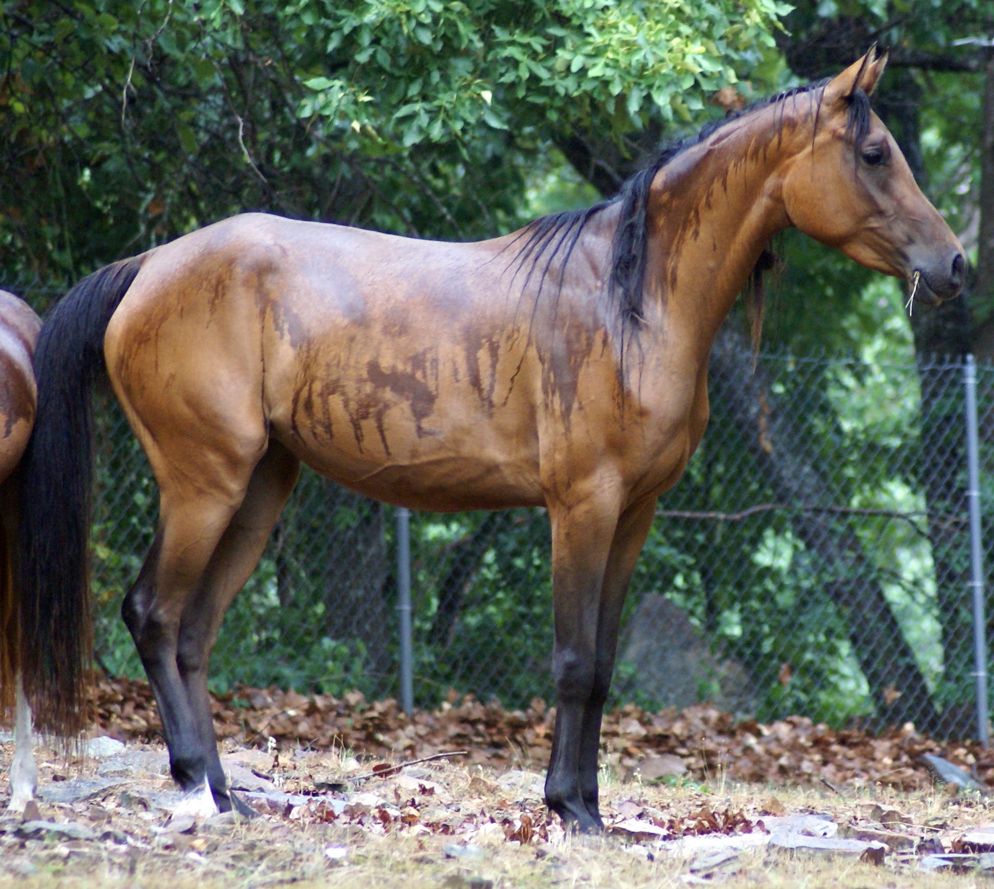 Anglo Arabian mare